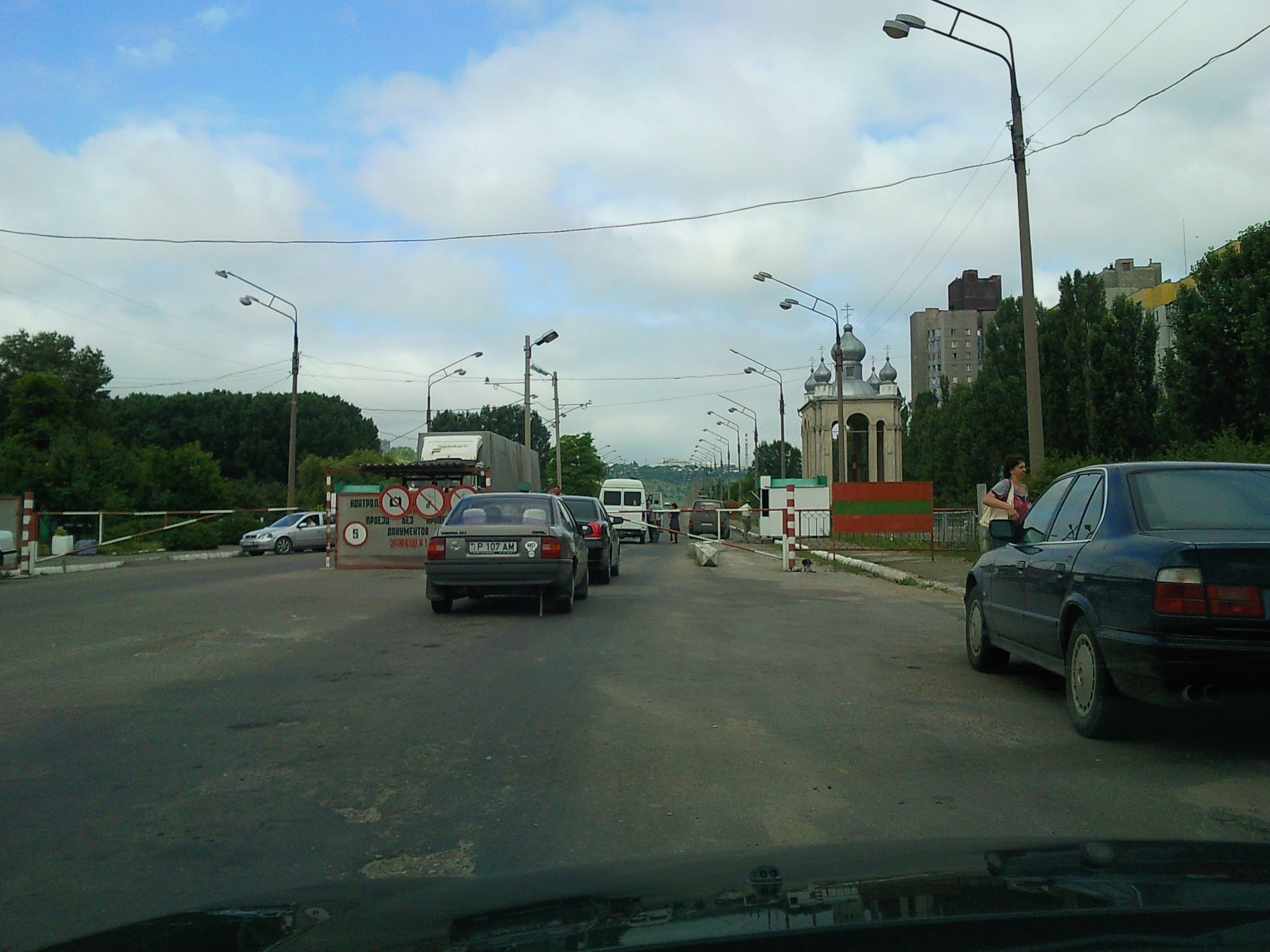 Таможенный пост на мосту через Днестр между Рыбницей и Резиной